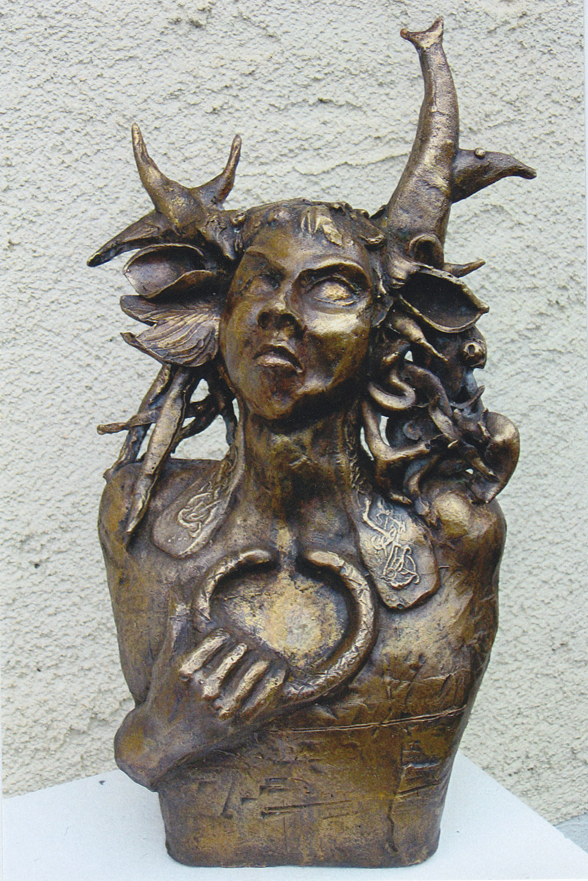 Cernunnos, eine keltische Gottheit. Bronzeskulptur von Künstlerin Christiana Heidemann